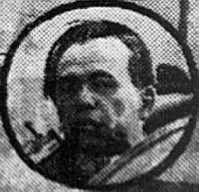 L'ingénieur automobile français René Stapp (1932).